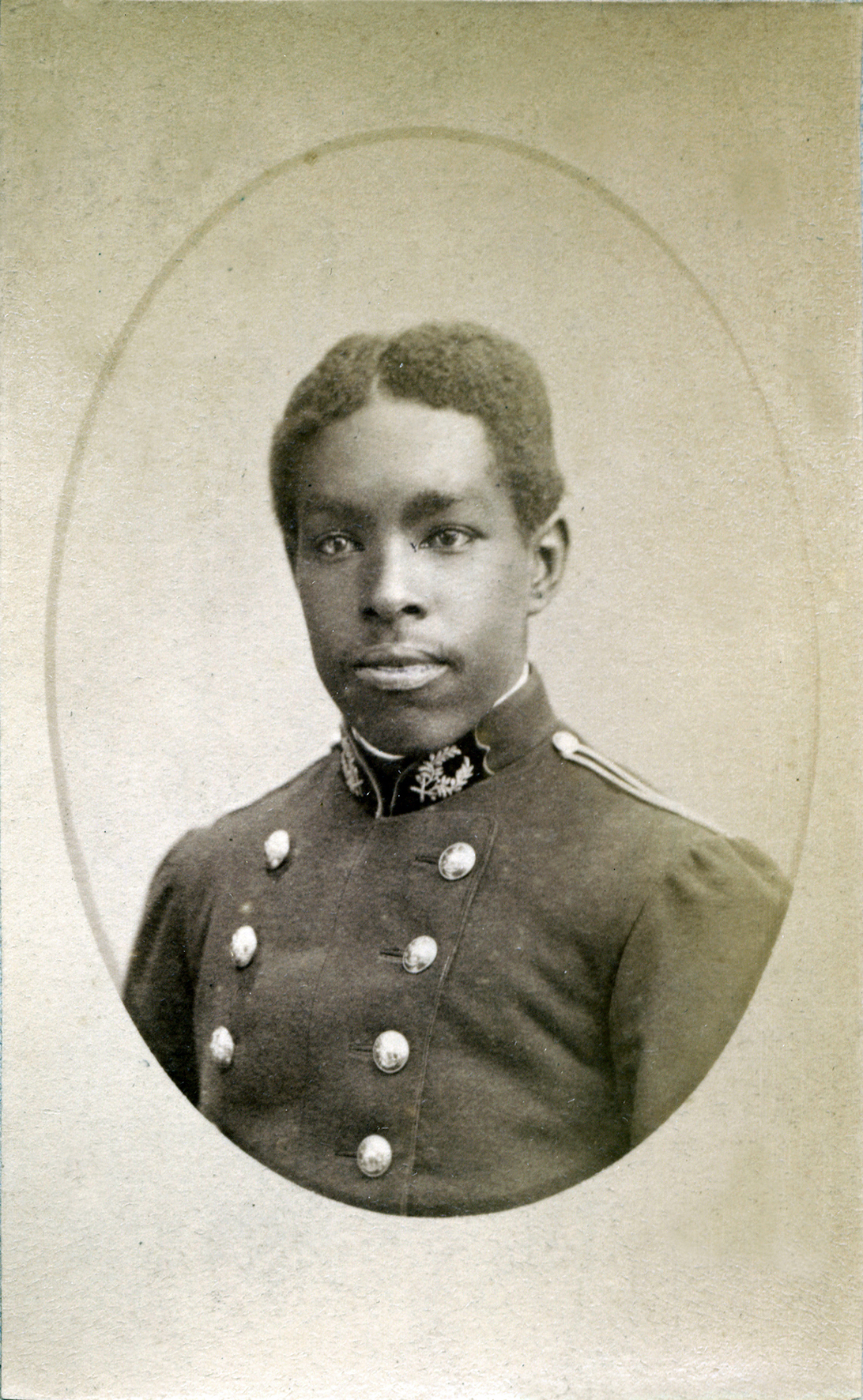 Sosthène Héliodore Camille Mortenol (1859-1930), élève officier guadeloupéen à l'école Polytechnique de Paris, photographie, 1878.